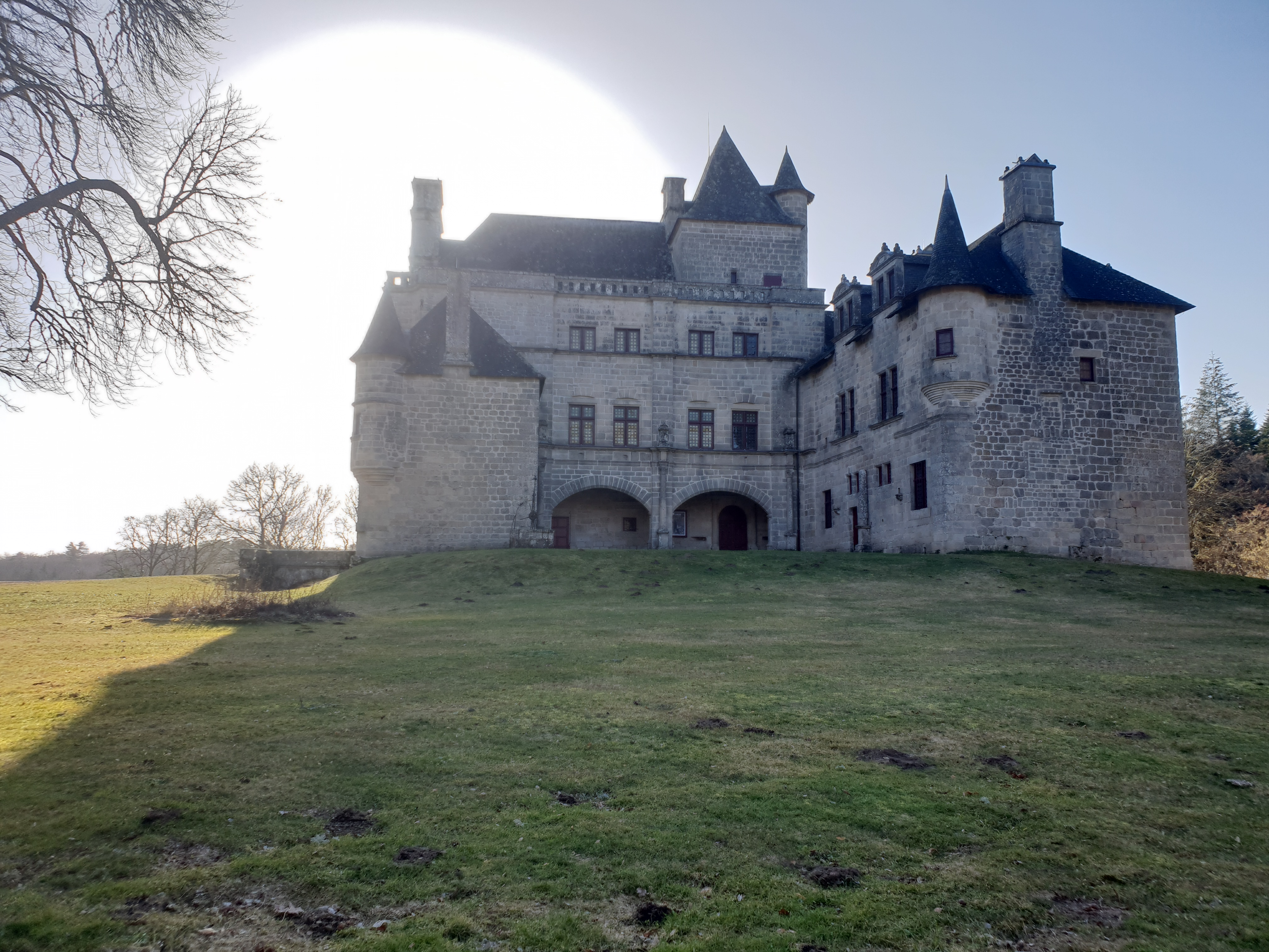 Photo montrant une face du château de Sédières